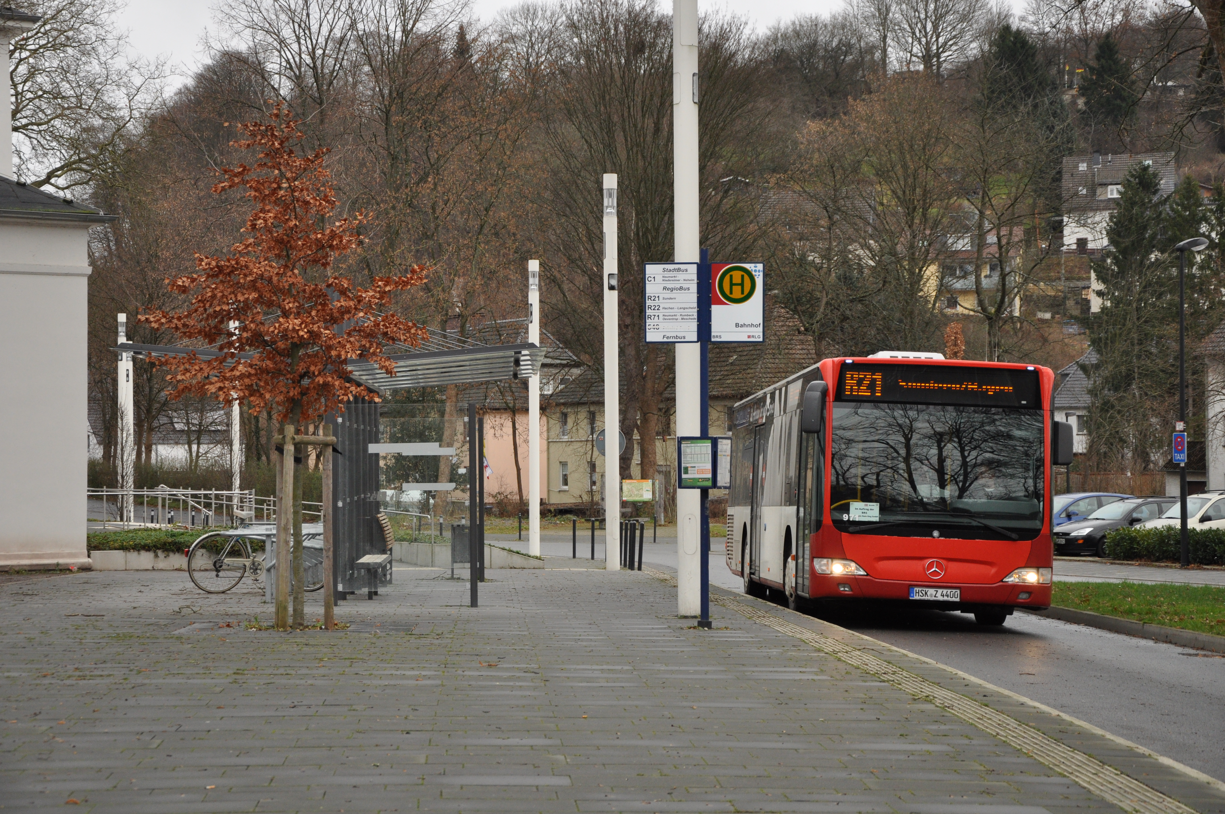 Bushaltestelle des Bahnhofs Arnsberg mit Citaro.